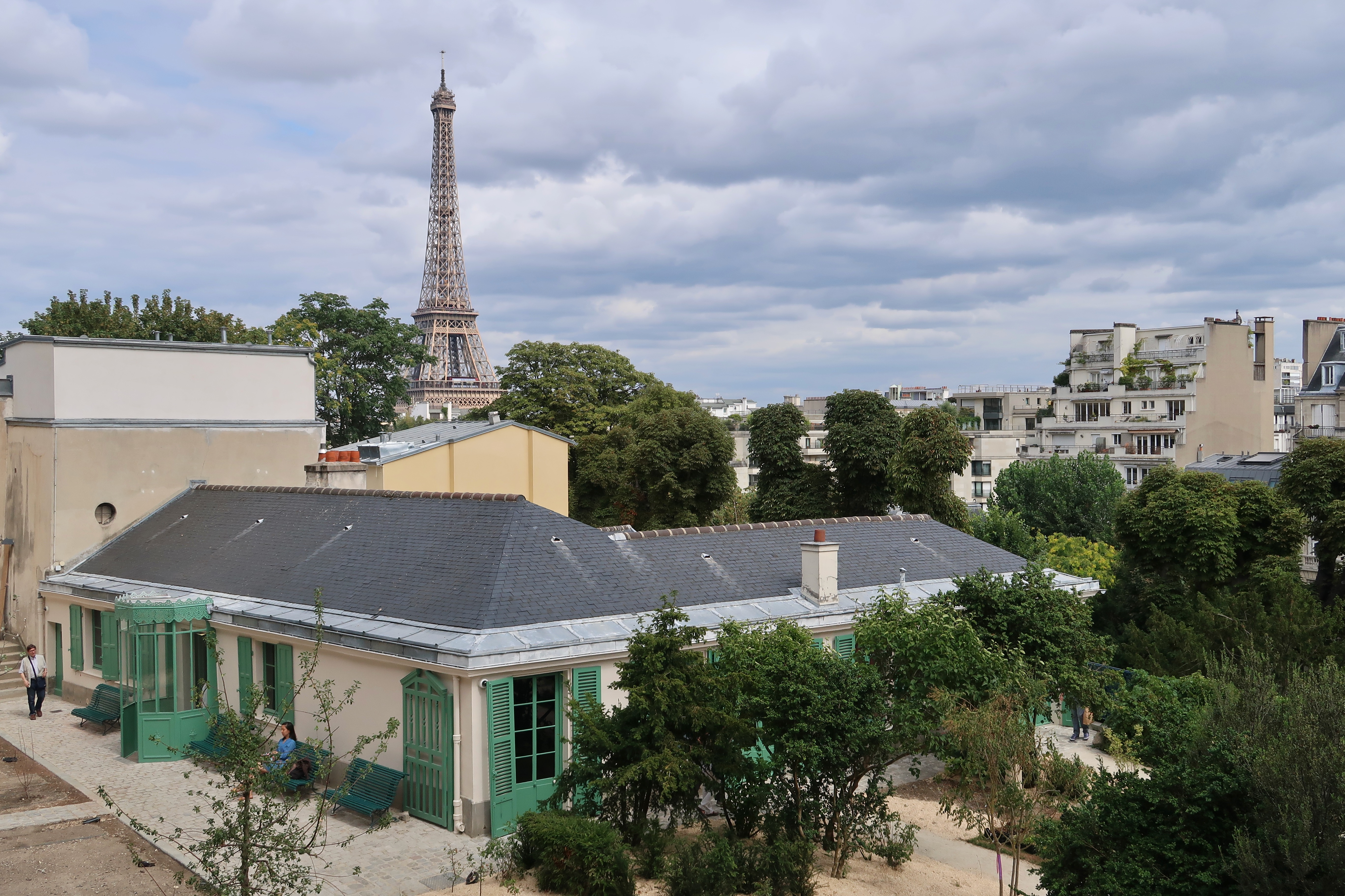 Maison de Balzac, rue Raynouard (Paris, 16e).